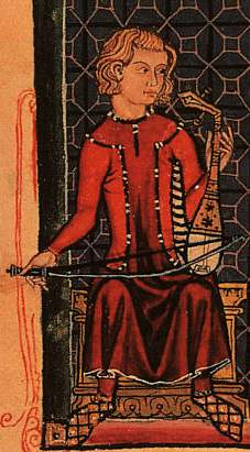 Rabel